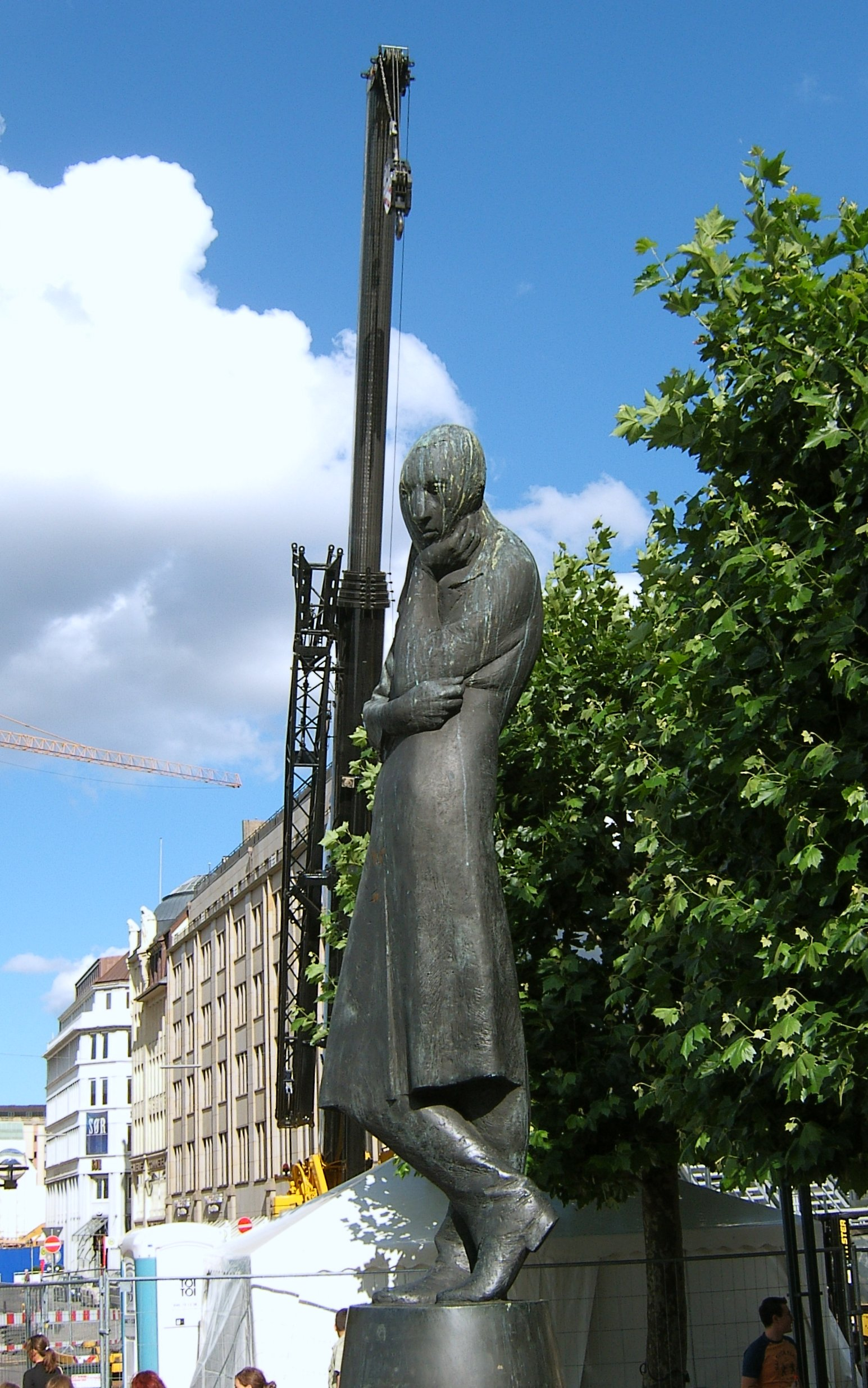 Heine-Denkmal, ursprünglich von Hugo Lederer geschaffen, am Rathausmarkt in Hamburg-Altstadt.